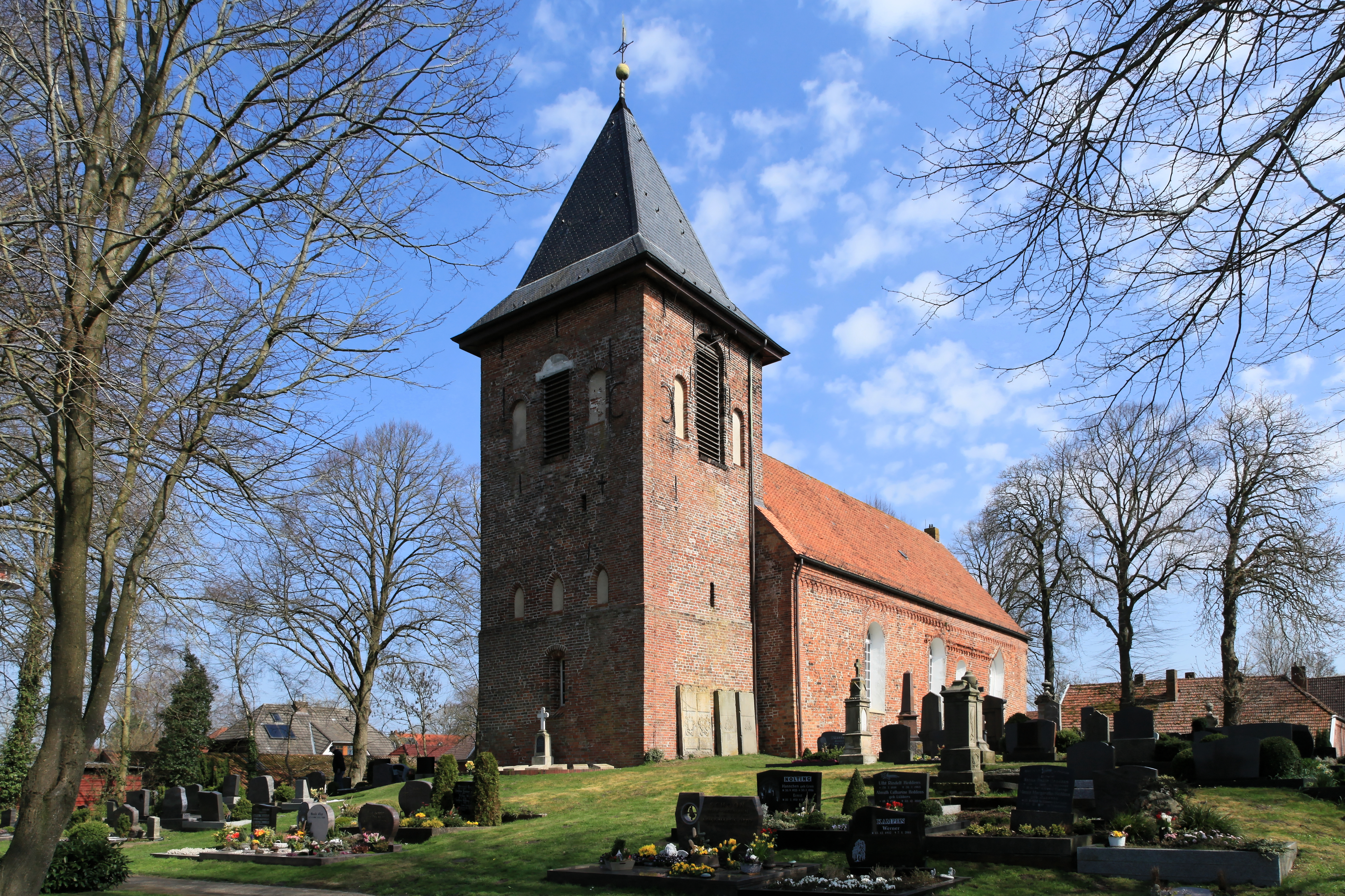 Reformierter Friedhof und Reformierte Kirche, Karkhörn in Nüttermoor, Leer (Ostfriesland)